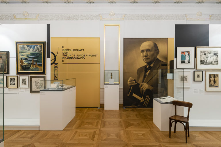 Braunschweig, Schlossmuseum: Sonderausstellung Gesellschaft der Freunde junger Kunst (GFJK). Auf dem Foto u.a. rechts hinten zu sehen ein Foto des Gründers der GFJK Otto Ralfs; diese Portrait wurde um 1950 von Heinrich Heidersberger angefertigt.